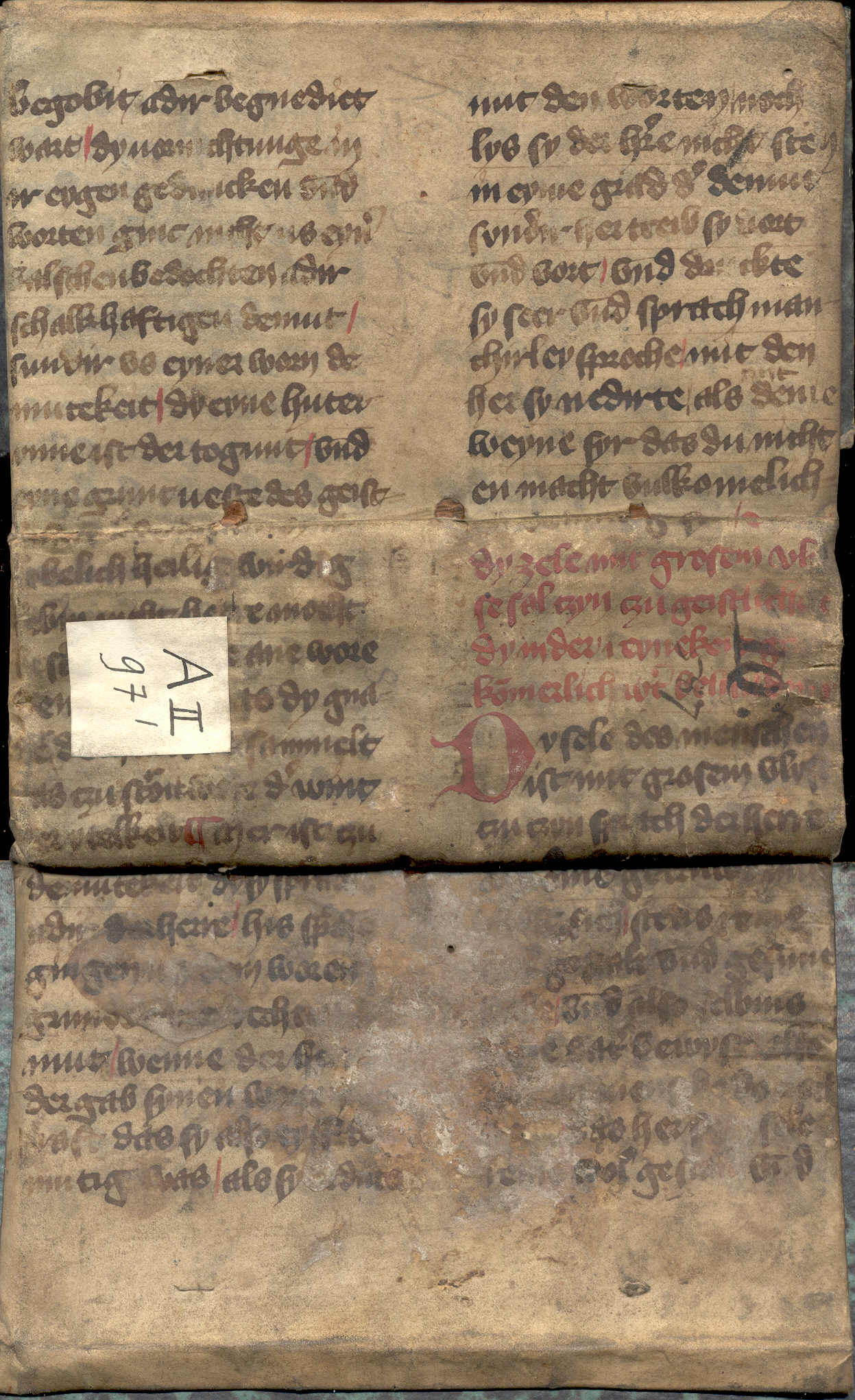 Pergamentmakulatur: Bucheinband. Deutschsprachiger religiöser Text (15.Jh.). Eingebunden: Homers Ilias und Odyssee in lateinischer Sprache (gedruckt 1537 und 1534, Oktavformat). Auf dem Vorderdeckel ein alter Wachsschaden.